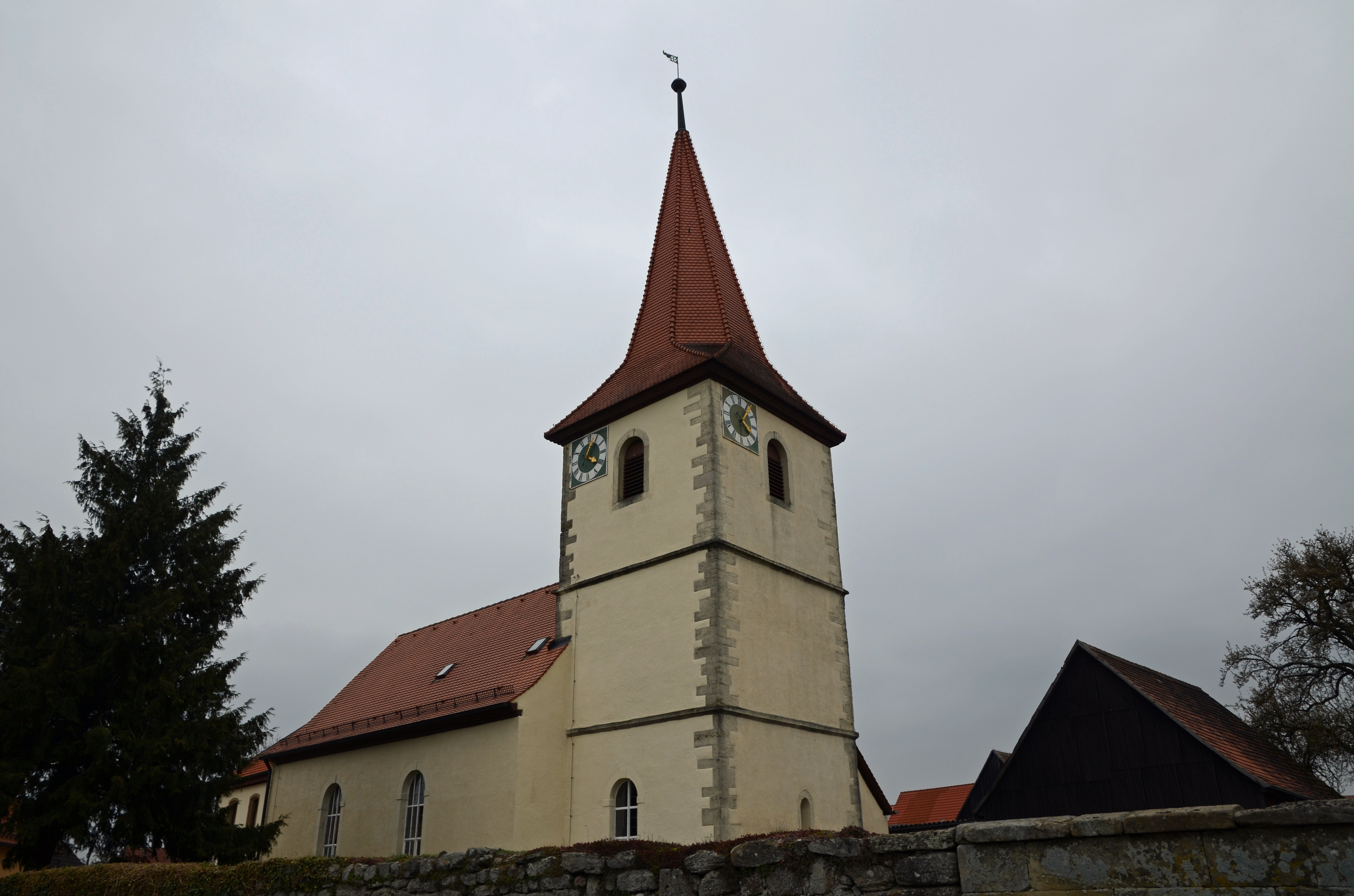 evang.-luth. Kirche St. Nikolaus in Preuntsfelden